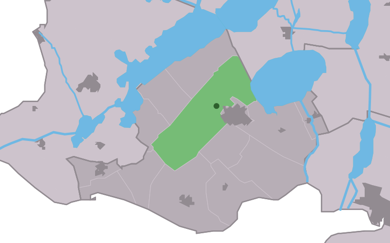 Kaartsje fan himrik fan Harich